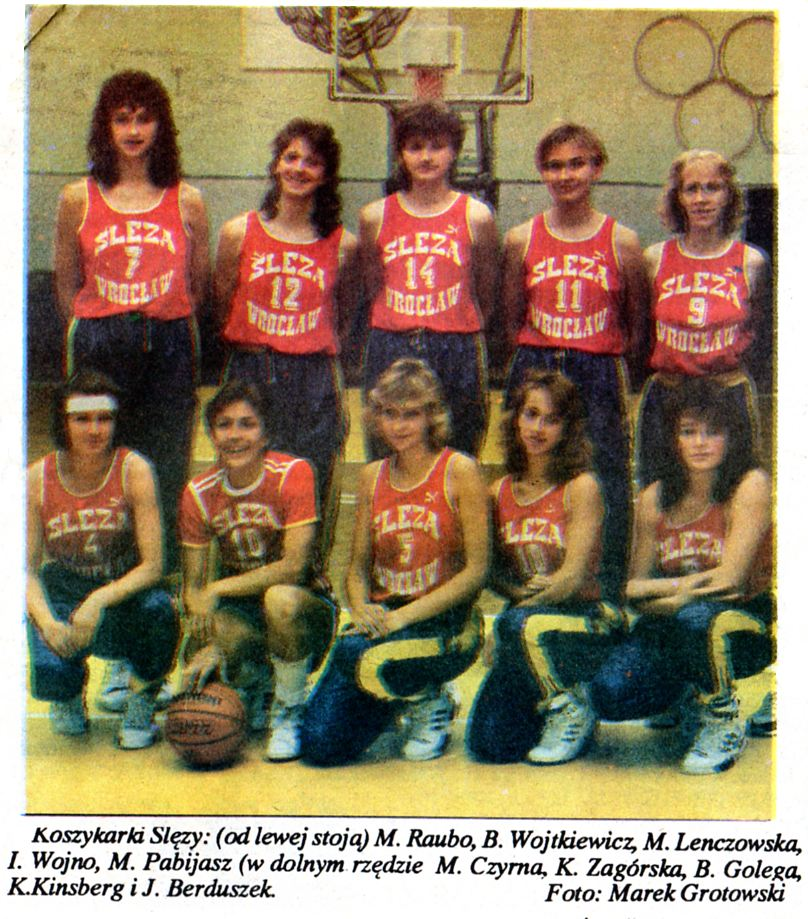 Zawodniczki Ślęzy Wrocław